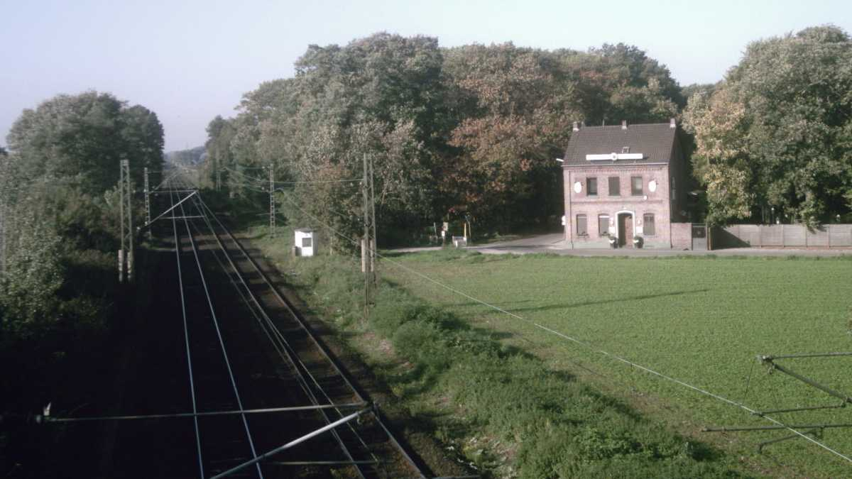 Das Landhaus Hochbend an der Eisenbahnstrecke in Tönisvorst-Hochbend im nordrhein-westfälischen Kreis Viersen.